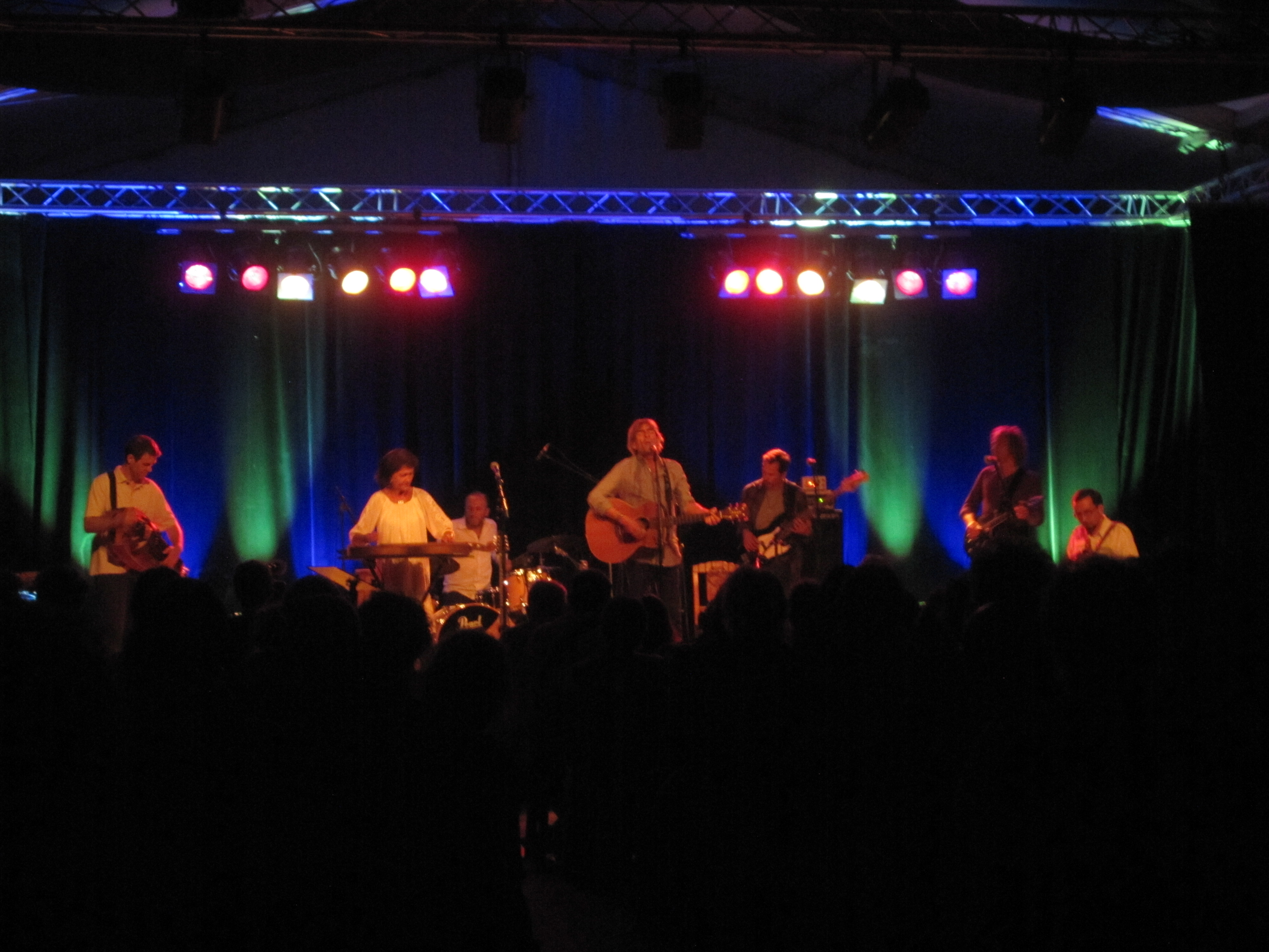 Malicorne le 16/08/2013 à Anost, avec, de g. à d., Gilles Chabenat, Marie de Malicorne, David Pouradier Duteil, Gabriel Yacoub, Yannick Hardouin, Nicolaïvan Mingot et Romain Personnat.